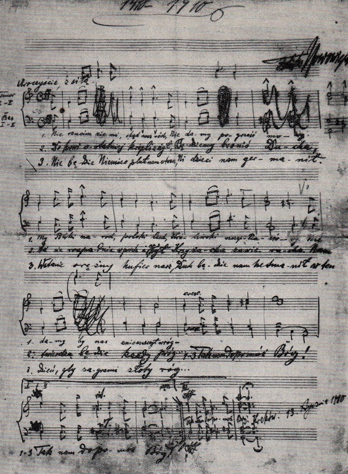 Feliks Nowowiejski. Rękopis "Roty" ze zbiorów Biblioteki Jagiellońskiej.